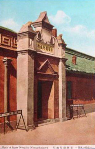 张家口-蒙疆银行总行